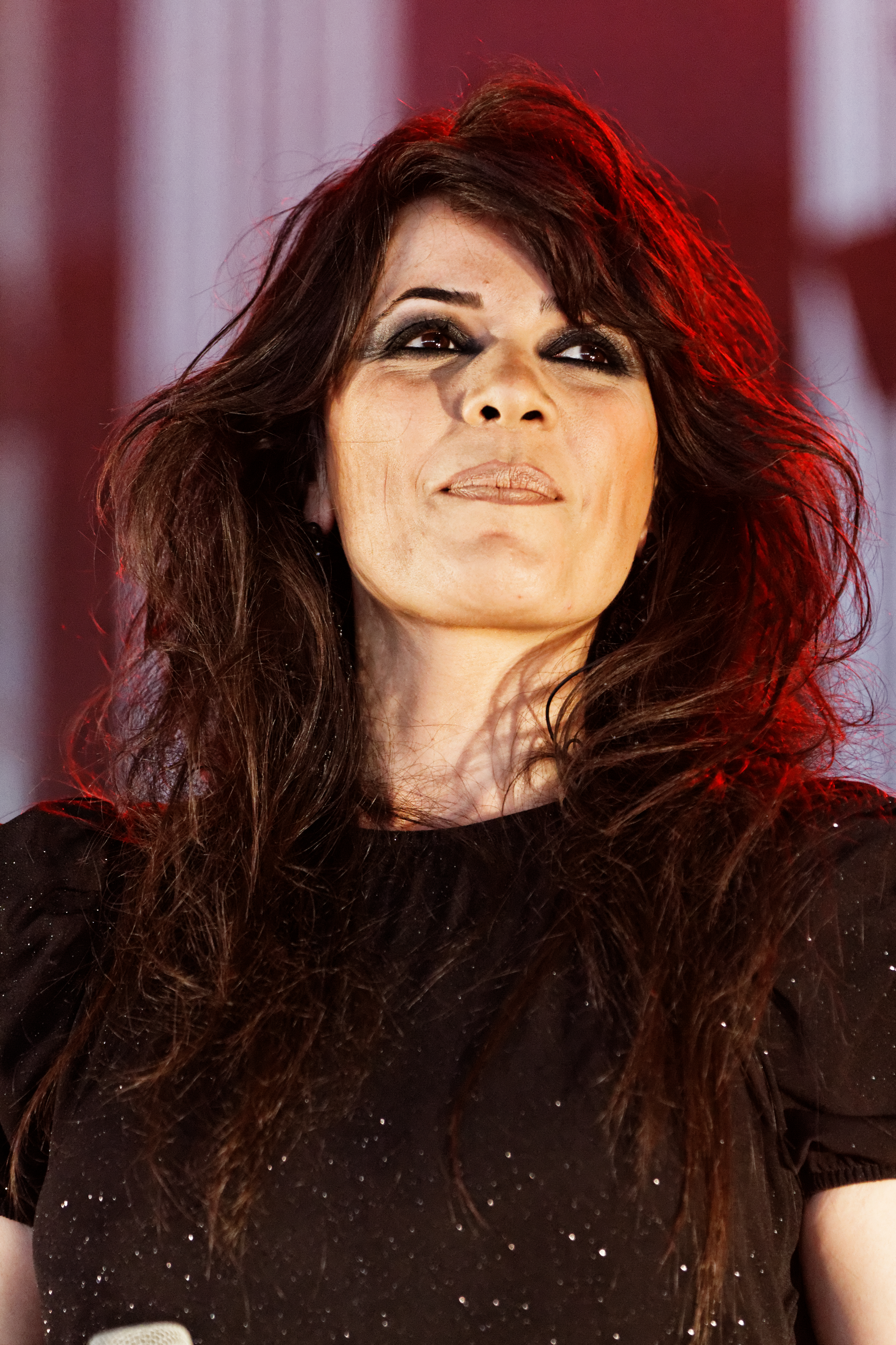 Yasmin Levy en concert sur la scène Cabaret lors du festival du bout du Monde à Crozon dans le Finistère (France).